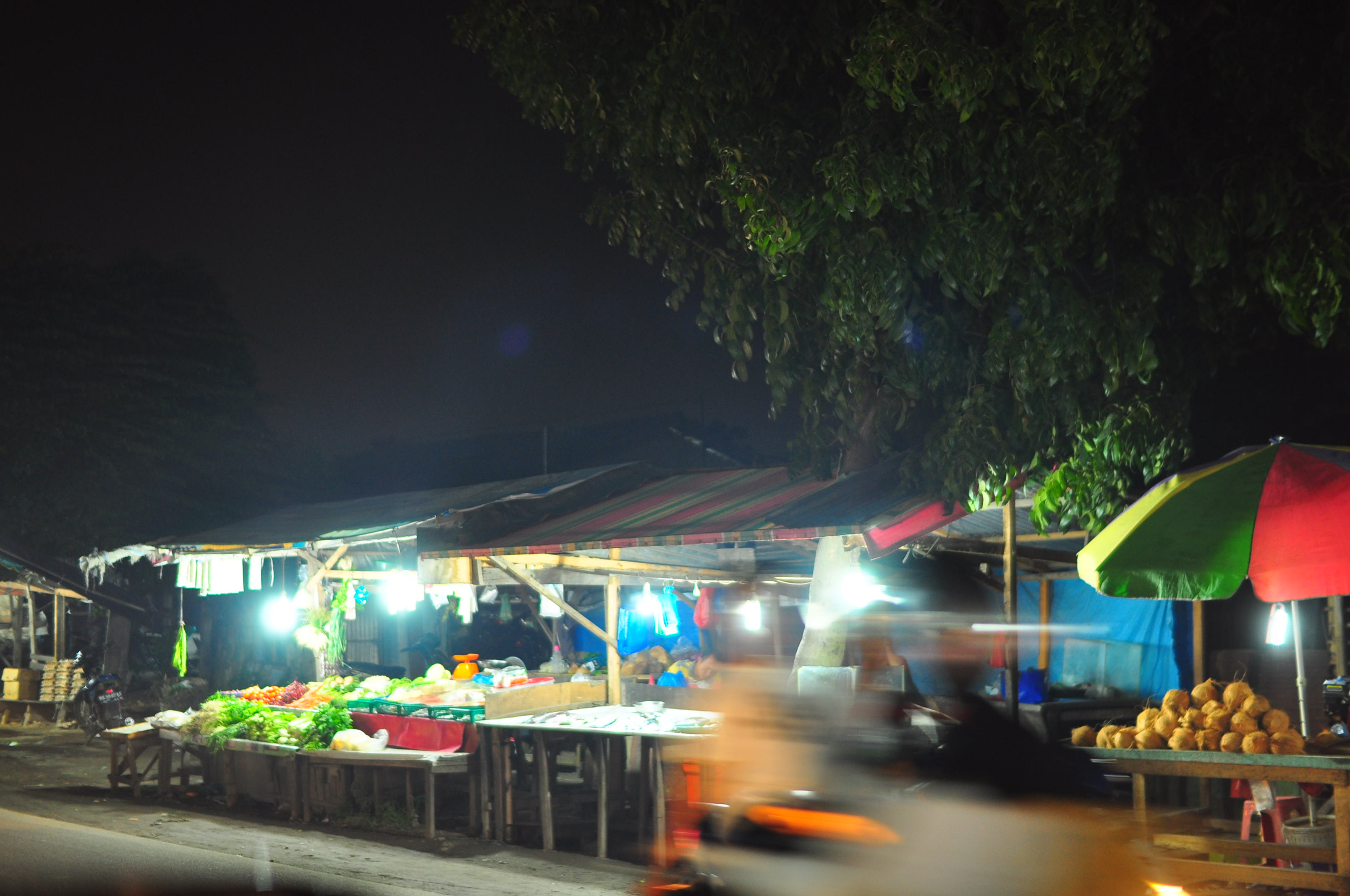 From Afternoon till midnight there are vegetables retailer along the road